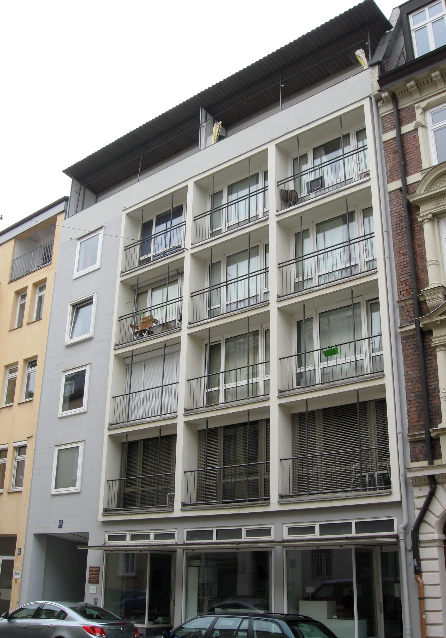 Heßstraße 82; Mehrfamilienhaus mit Läden, betonierter, loggienausbildender Rasterfassade und raumhohen Verglasungen, 1952–54 von Grete und Werner Wirsing. Dachgeschoss mit Flugdach, Loggien mit filigranen Verstrebungen, Schaufenster mit Vordachplatten.